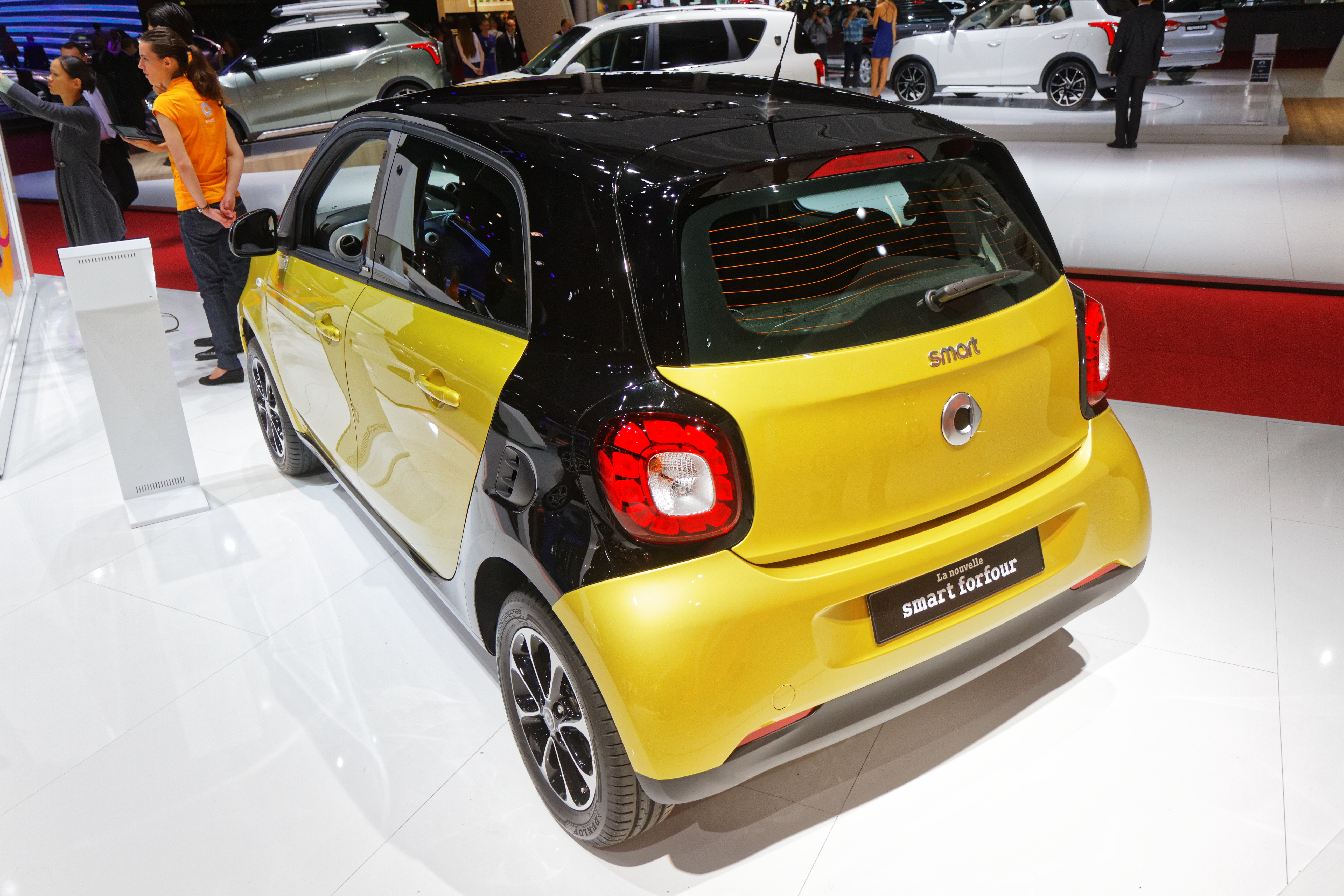 Une Smart Forfour présentée lors du mondial de l'automobile de Paris 2014.